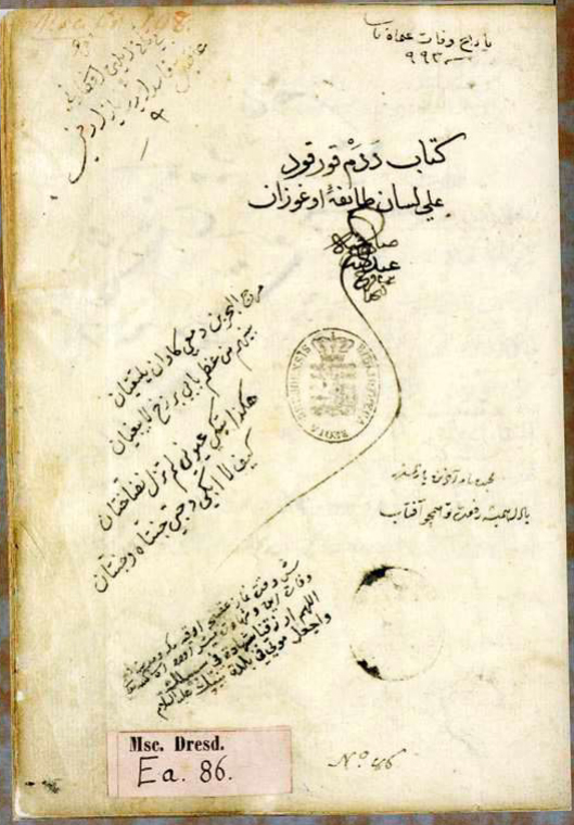 Dede Korkut Kitabı'nın Dresden Şehir Kütüphanesi nüshasından bir sayfa.